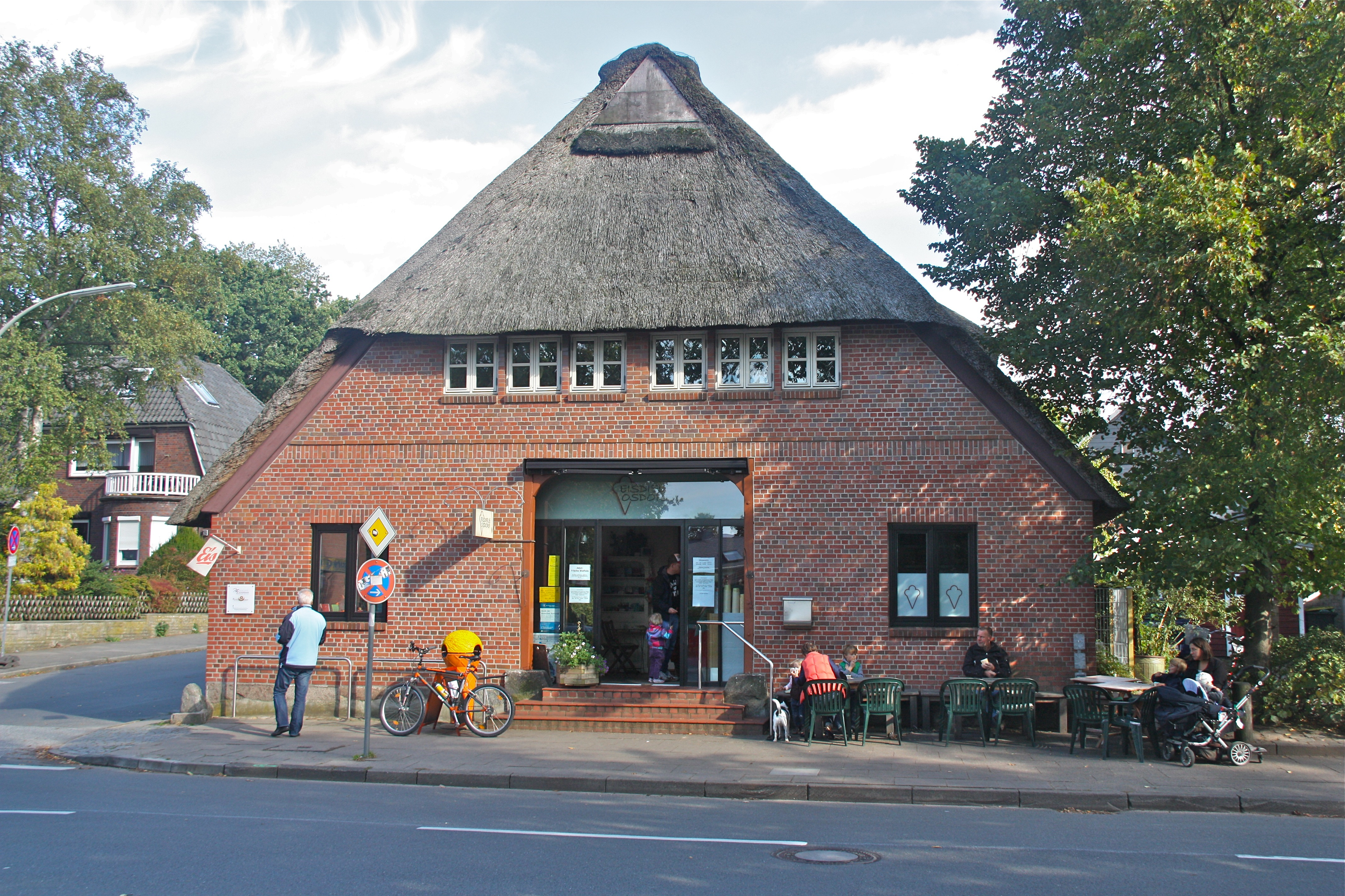 Hamburg, Osdorf, Rugenbarg 10This is a photograph of an architectural monument.